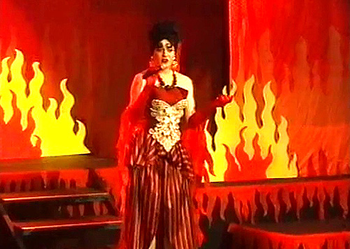 BeV moderiert die "Oz-translesbischwule-Party"-Show, Berlin 2000